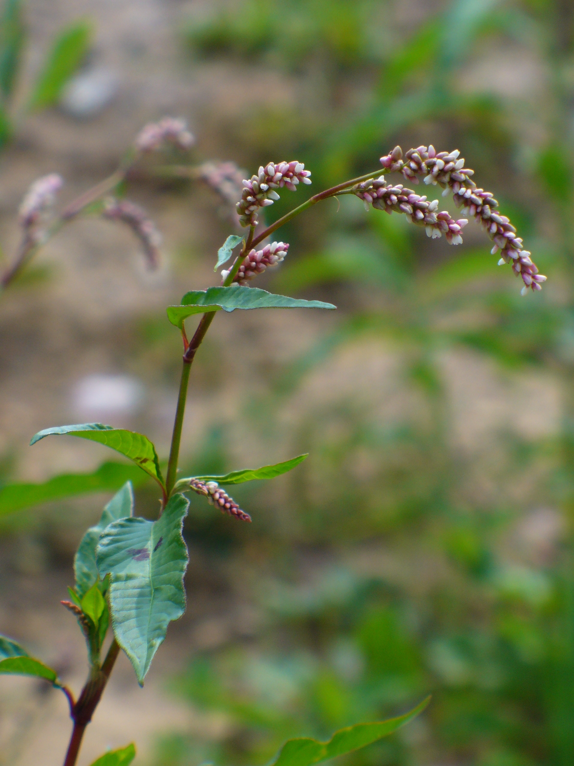 Persicaria maculosa in Hamburg